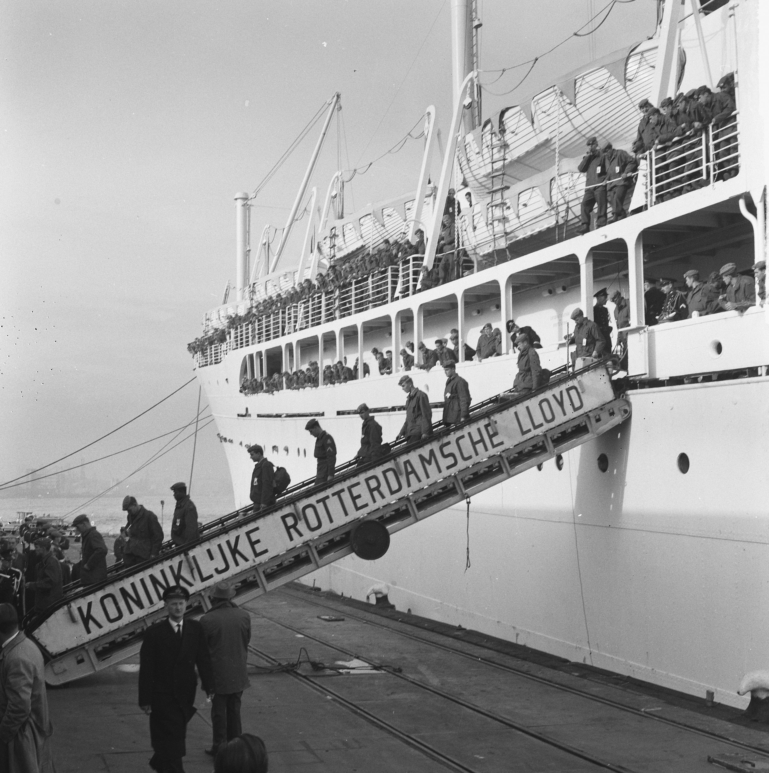 Collectie / Archief : Fotocollectie Anefo Reportage / Serie : [ onbekend ] Beschrijving : 1000 militairen met Seven Seals uit Nieuw-Guinea teruggekeerd Datum : 5 november 1962 Trefwoorden : militairen Fotograaf : Koch, Eric / Anefo Auteursrechthebbende : Nationaal Archief Materiaalsoort : Negatief (zwart/wit) Nummer archiefinventaris : bekijk toegang 2.24.01.03 Bestanddeelnummer : 914-4928